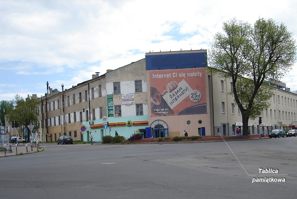 Budynki byłych koszar 37 Łęczyckiego Pułku Piechoty w Kutnie 07.1967.